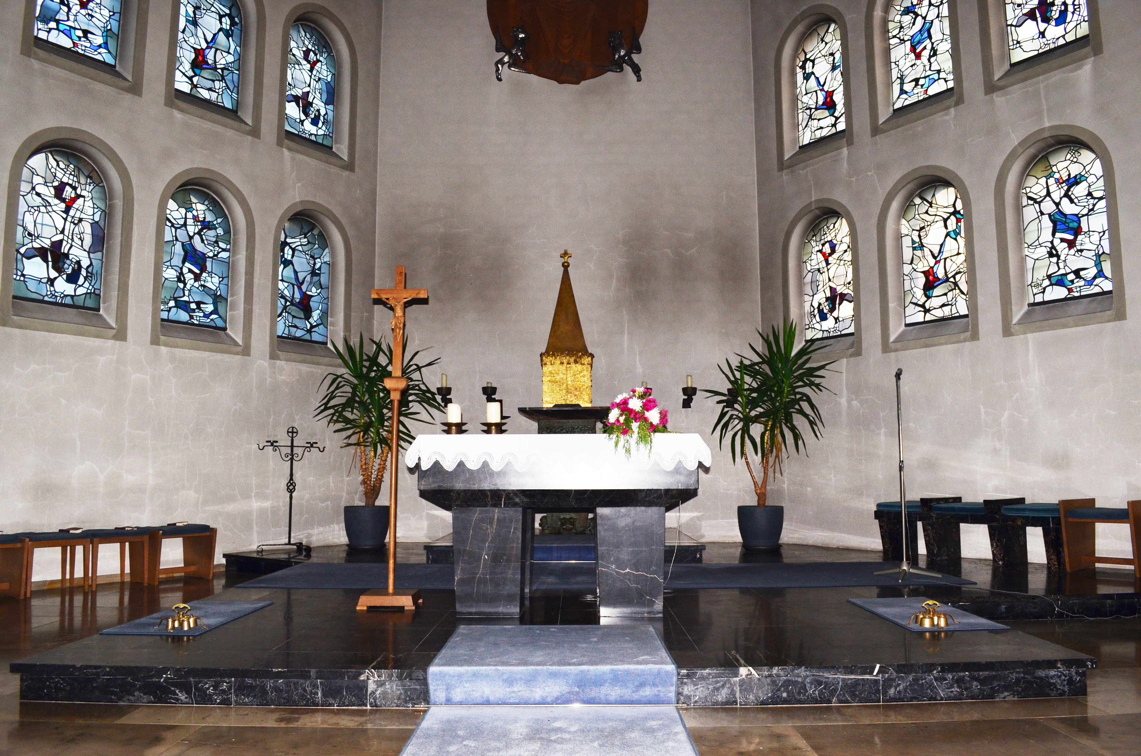 Alme, St. Ludgerus, Geamtansicht des Altarraumes